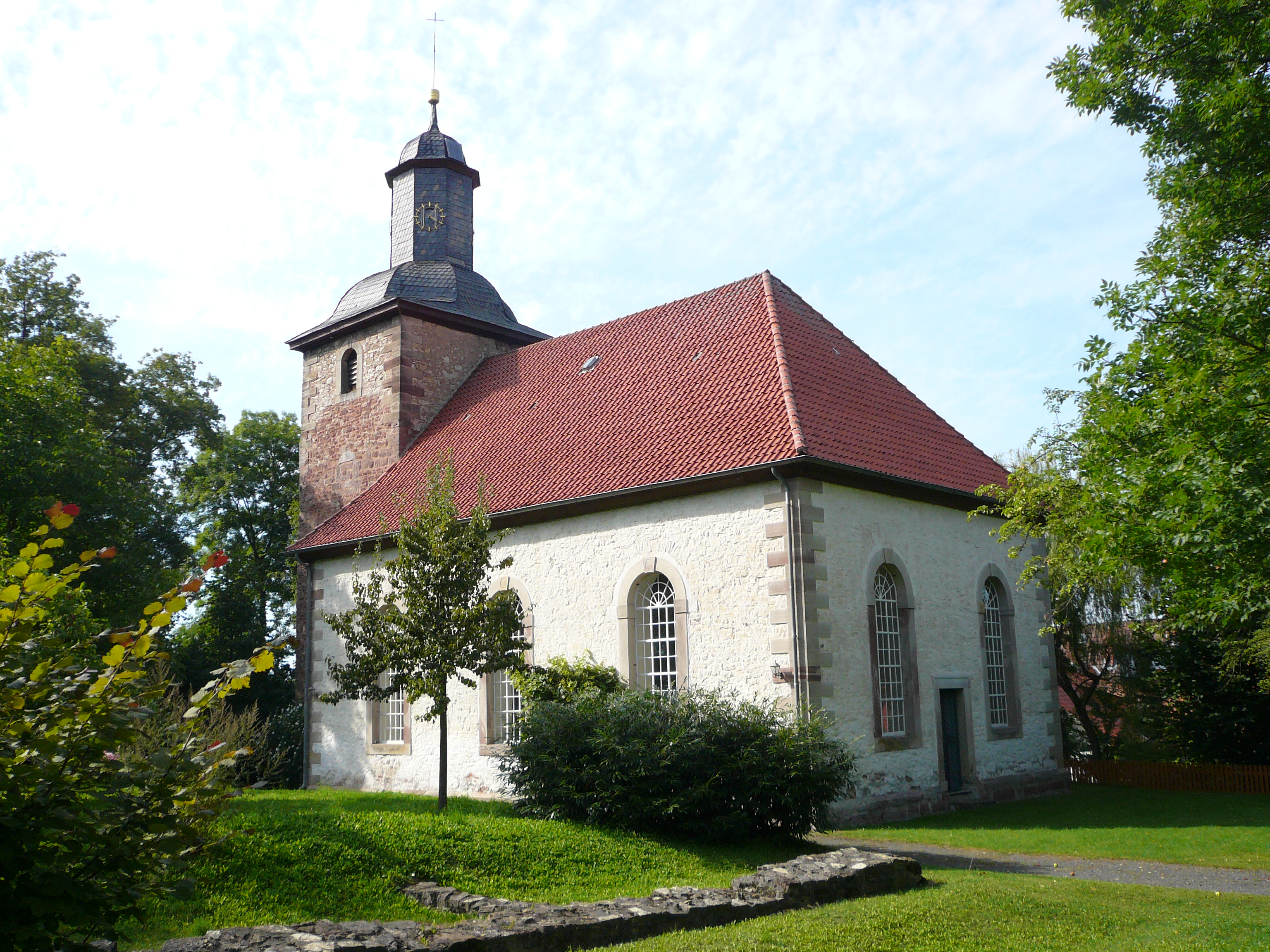 Ev.-luth. Kirche St. Nikolai in Weißenborn, Gemeinde Gleichen, Niedersachsen. Ursprünglich Wehrkirche mit Wehrturm aus Bruchsteinmauerwerk, errichtet um 1400; 1738/39 Anbau des verputzten Kirchensaals